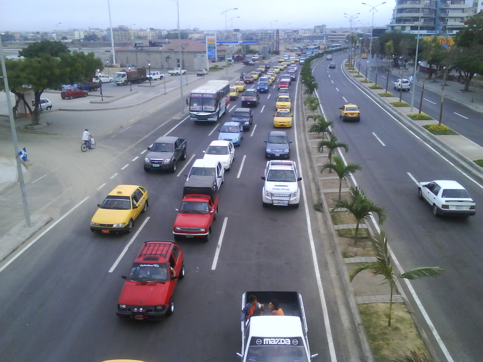 El tráfico en manta es cada vez mayor, pero las futuras medidas, proyectos urbanísticos y sistemas de tranporte prometen ayudar a la cuidad a controlar el alto nivel de tráfico en la ciudad